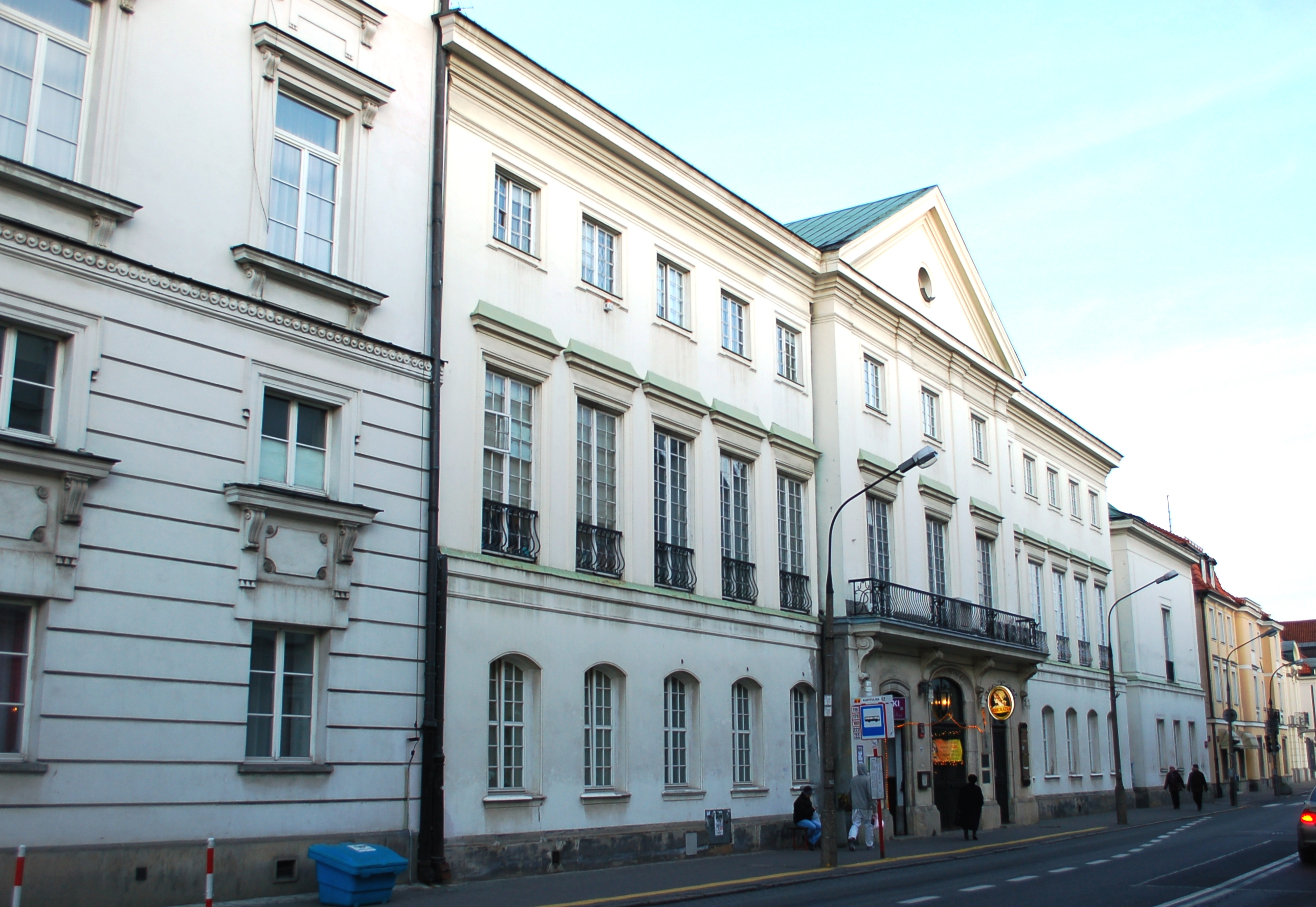 Chodkiewicz Palace, Ulica Miodowa, Warsaw